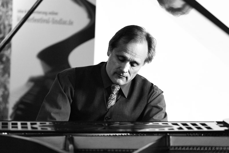 Falko Steinbach 28.02.2012 Kulturzentrum Lindlar